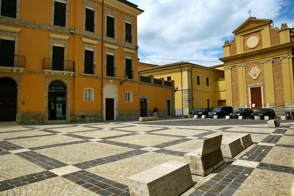 Piazza Sant'Agostino a Teramo, sulla destra la facciata della quattrocentesca Chiesa omonima